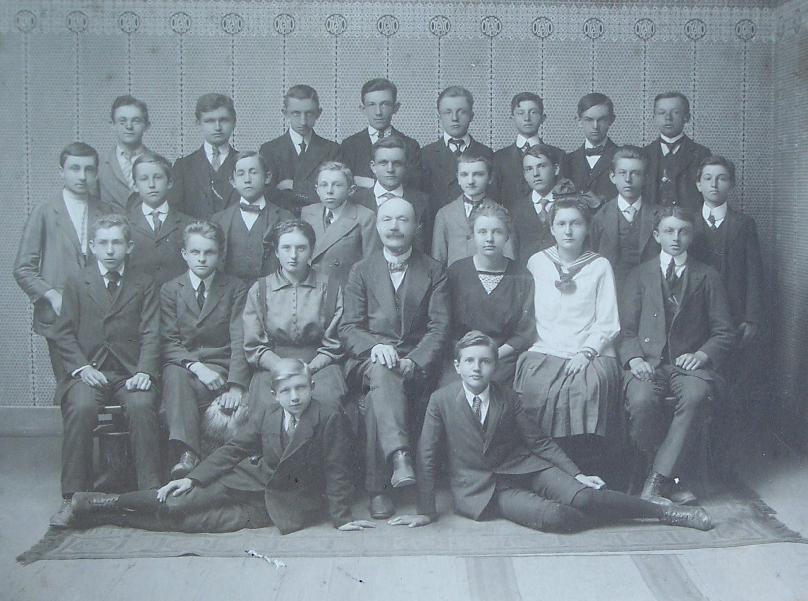 Jan Soukup - oblíbený profesor na reálné škole v Rakovníku. Fotografii pořídila Barbora Honzíková dne 01.01.2006 ve Státním Okresním archivu v Rakovníku